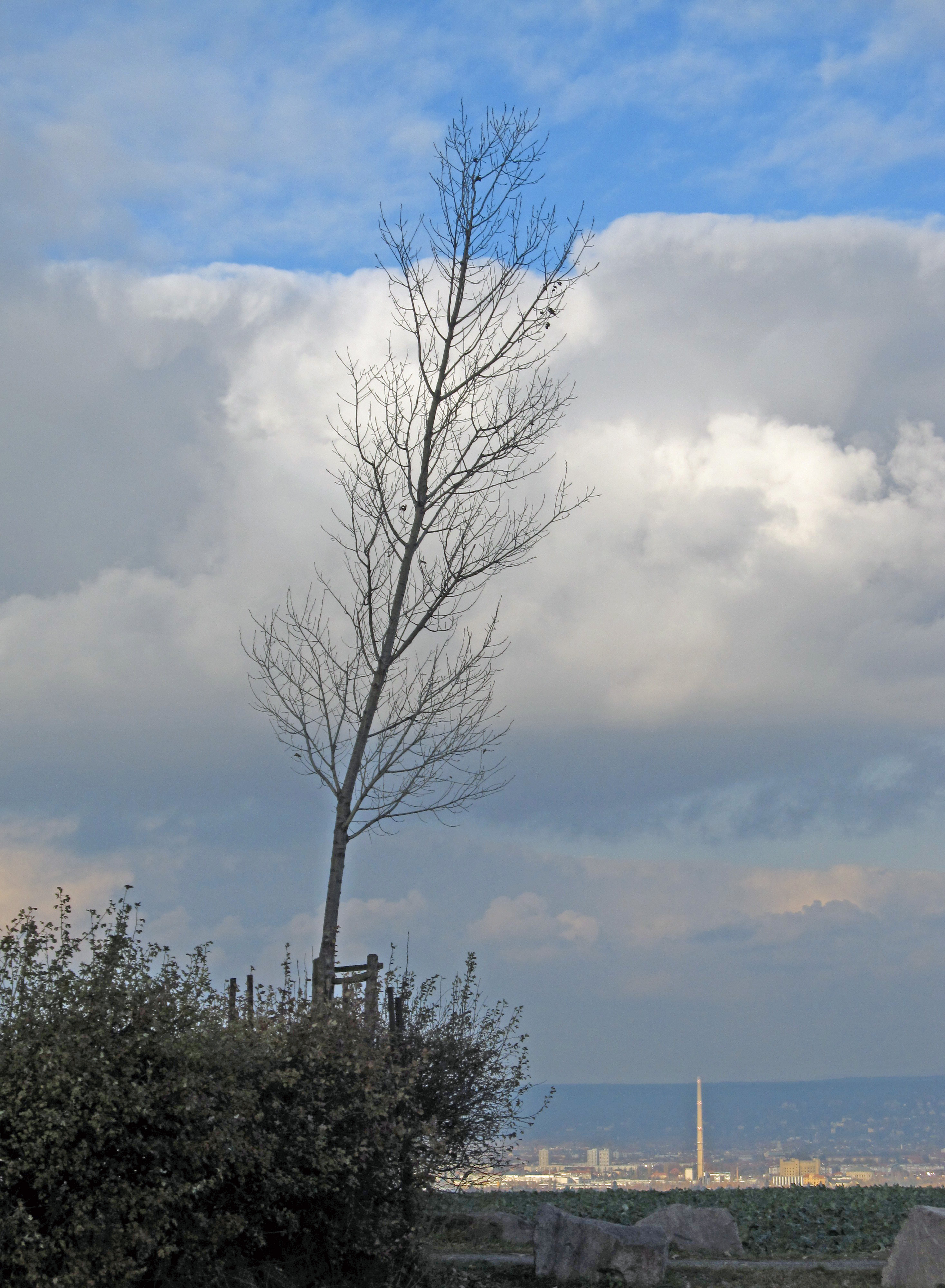 "Neue" Babisnauer Pappel, Gemeinde Kreischa, Landkreis Sächsische Schweiz-Osterzgebirge